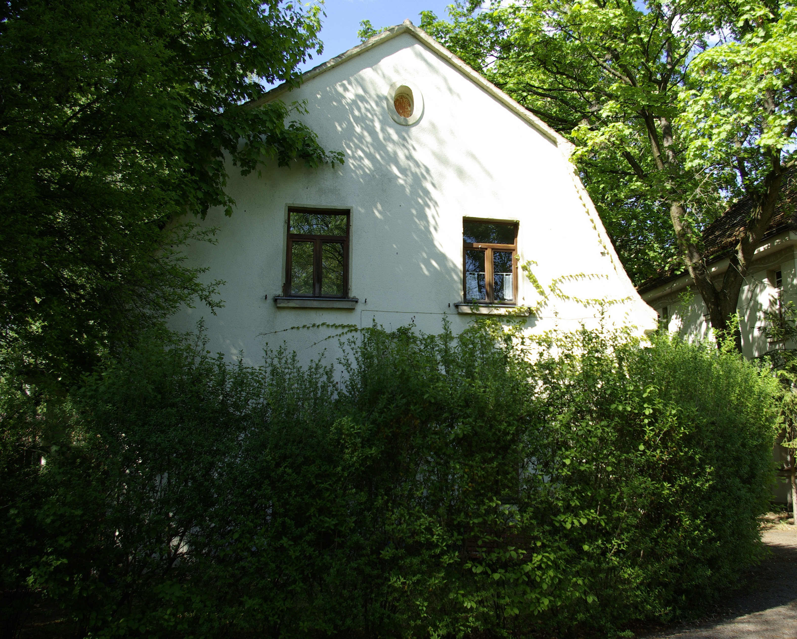 Neumühle 10, Nebengebäude der ehemaligen Fabrikantenvilla (Neumühle 12) in Erlangen.